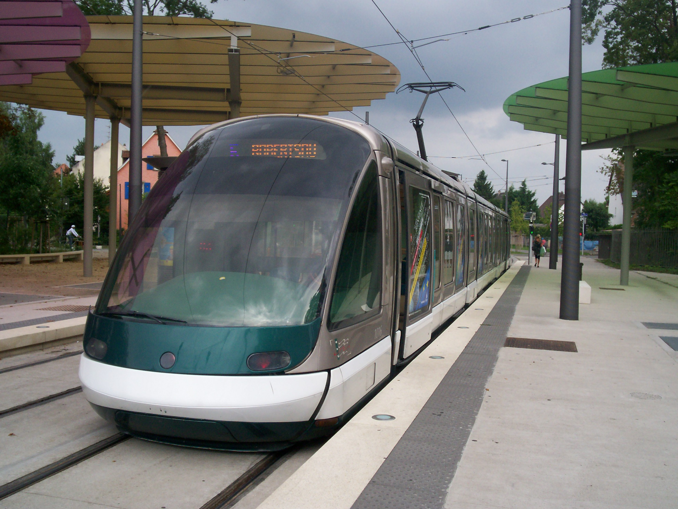 Tramway de Strasbourg Ligne E à Robertsau Boecklin, le 13 Août 2009